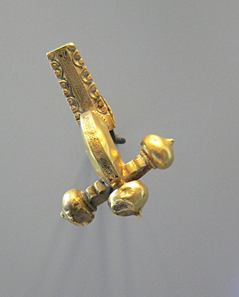 Fibule cruciforme Tôle d'or, décor gravé Cette fibule en or possède un décor très rare composé d'une frise et de trois petits bustes de personnages en médaillons. Paris, lit de la Seine, rive gauche Epoque gallo-romaine, 2ème moitié du IV° siècle Poids : 21,8 g. AM 1089, Musée Carnavalet, Paris